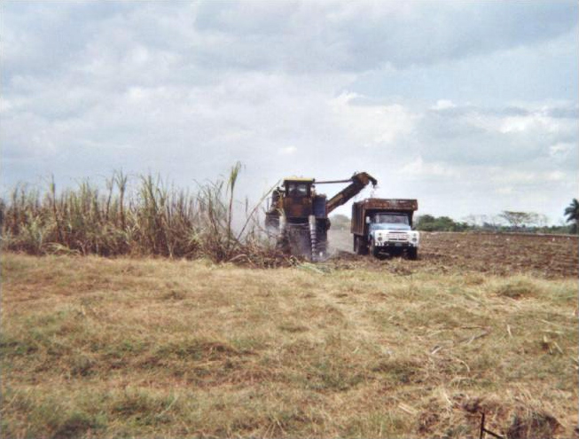 Récolte de la canne à sucre à Cuba